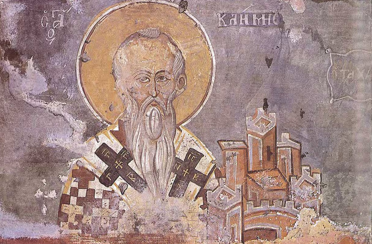 Св. Климент Охридски со модел на градот Охрид во рацете. Црквата „Св. Спас" во Лескоец